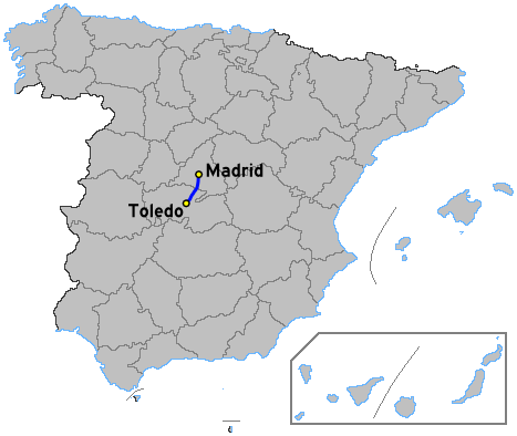 mapa de la autovía española a42